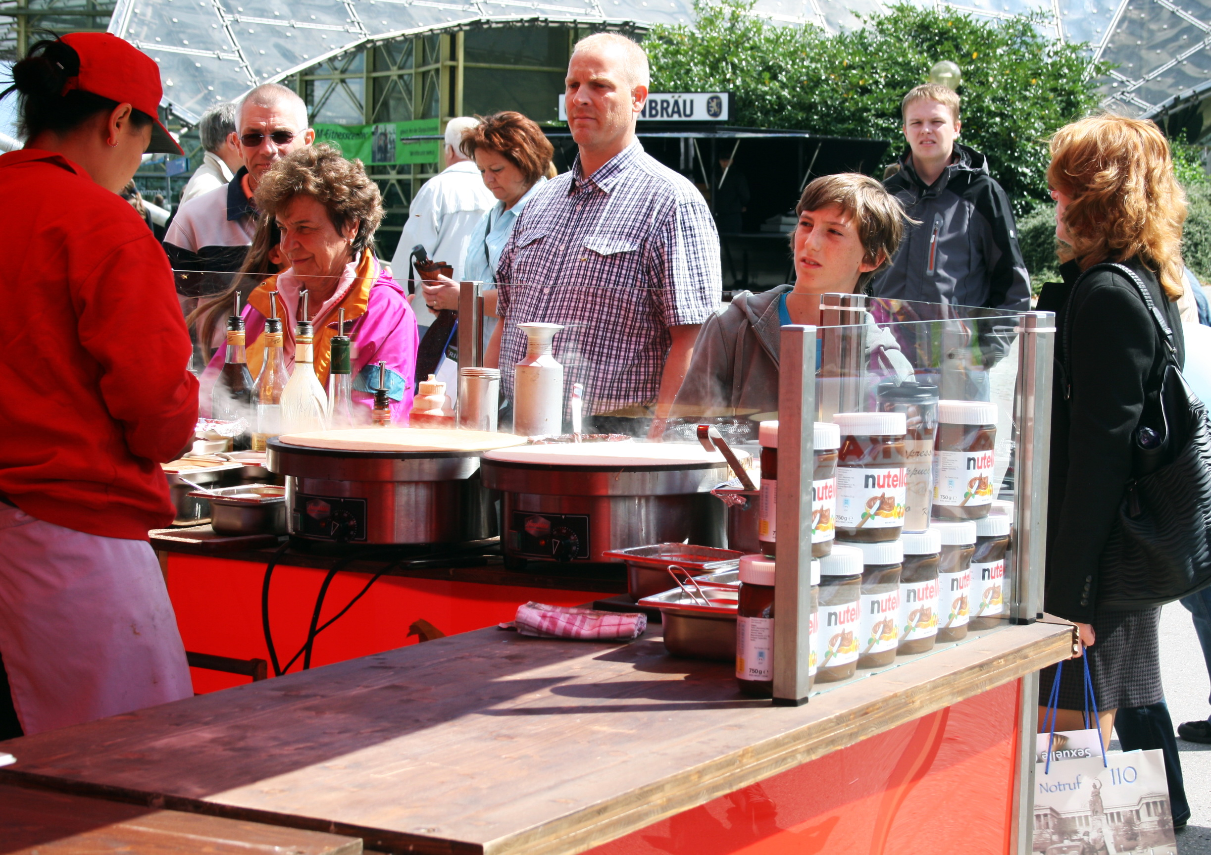 Crêpesstand im Olympiapark München.